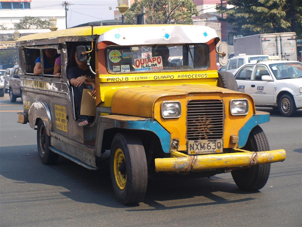 Jeepney in Manila, Philippines